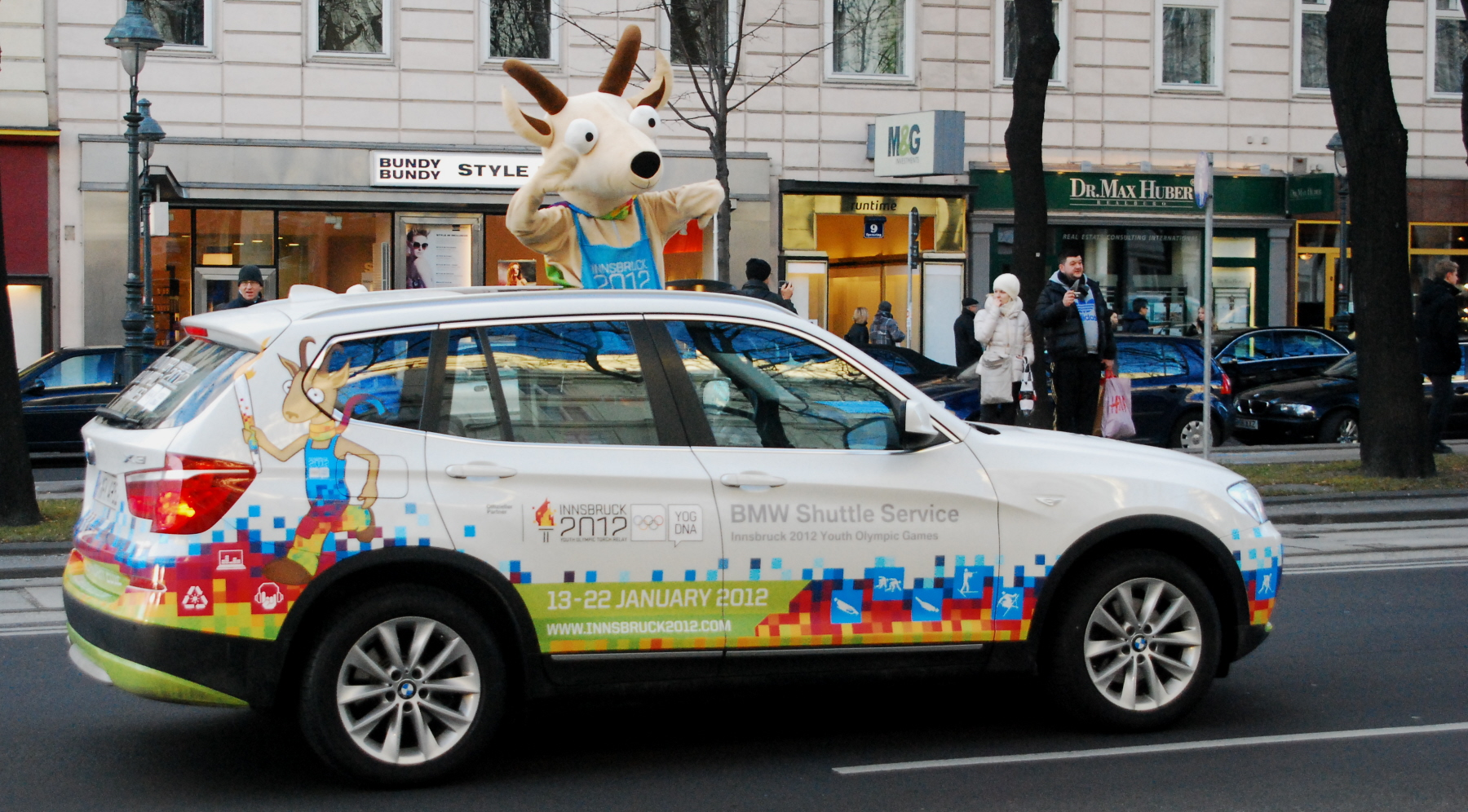 Maskottchen der Olympischen Jugend-Winterspiele 2012 in Innsbruck auf der Wiener Ringstraße